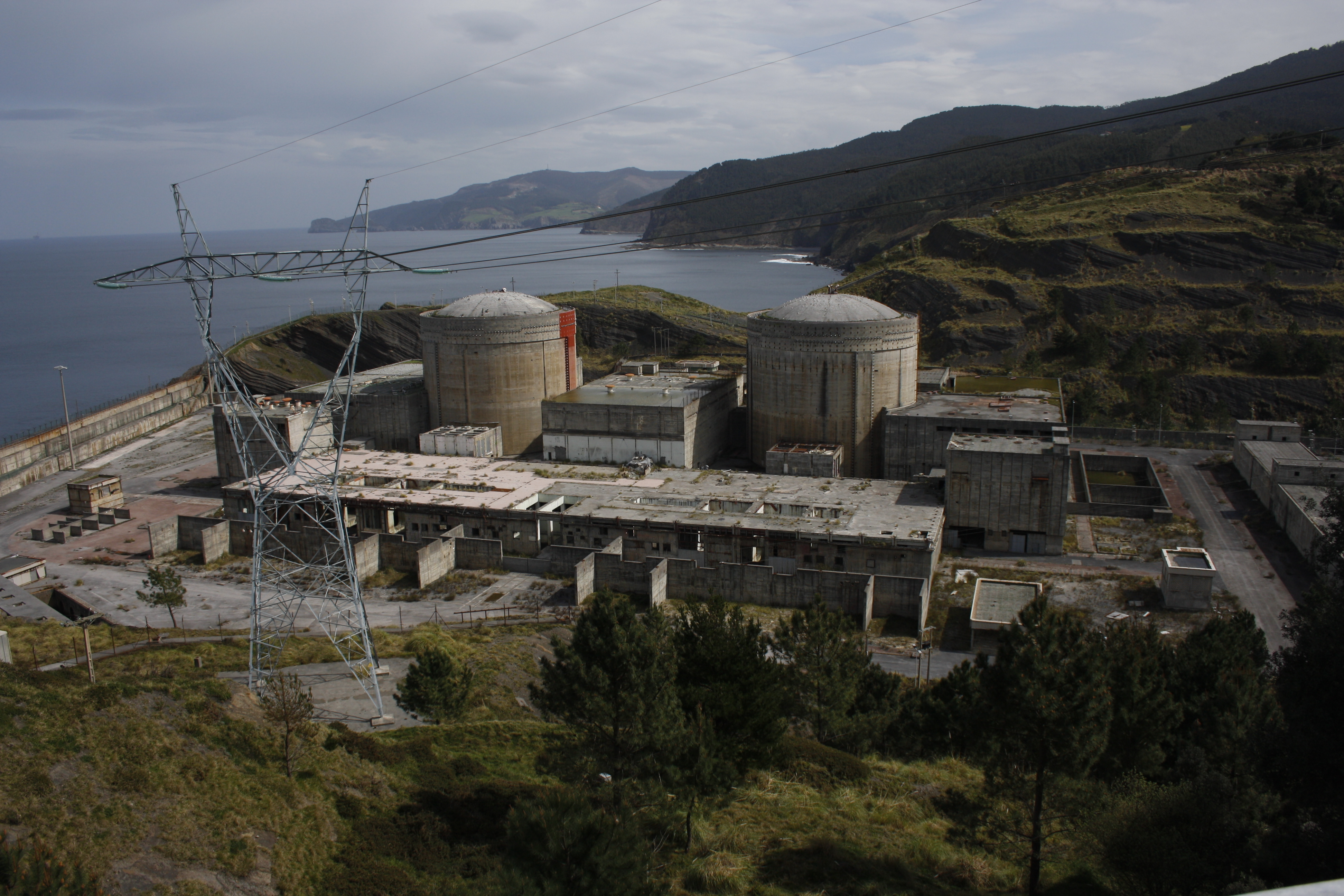 Vista de la central nuclear de Lemoniz desde la carretera